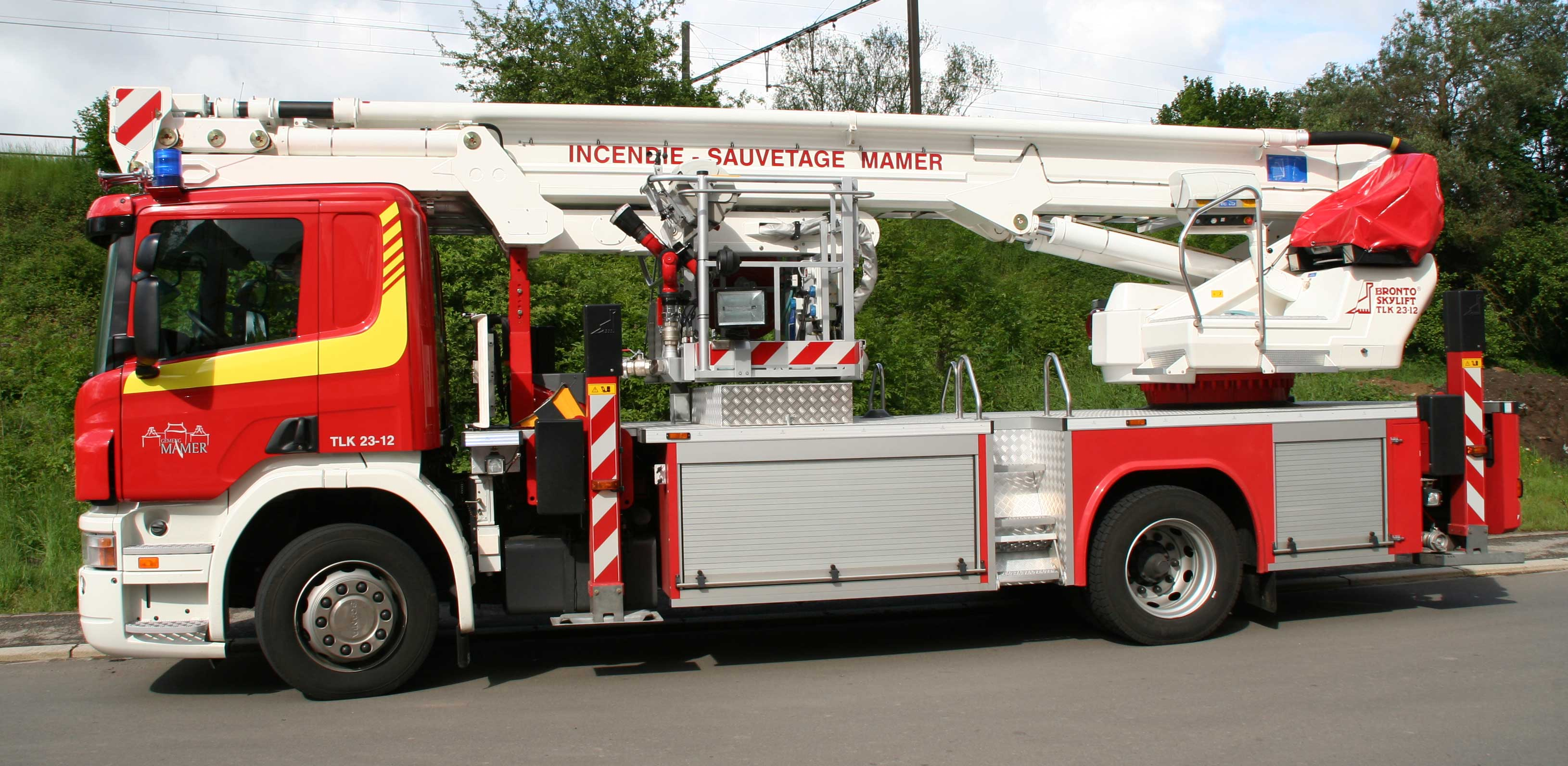 Pomp Mamer TLK 23-12.